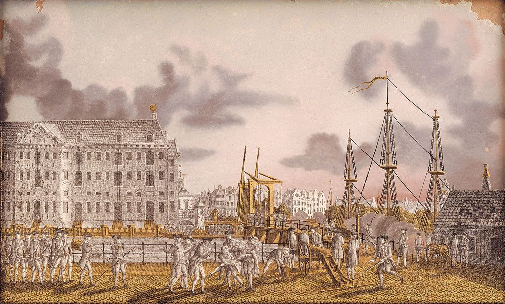 Strijd tussen patriotten en prinsgezinden bij de Kattenburgerbrug, 30 mei 1787. Op dit schilderij is een gevecht te zien tussen de patriotten en oranjegezinden op de Kattenburgerbrug. In mei 1787 kregen de patriotten de macht in het stadsbestuur, wat leidde tot gevechten tussen de oranjegezinde ‘bijltjes’ (scheepstimmerlieden) van Kattenburg en de patriotse burgerwacht. Op het schilderij staan de patriotten op de voorgrond klaar met kanonnen. De oranjegezinde eilandbewoners hebben echter de bruggen opgehaald en kunnen de patriotten daardoor een tijd tegenhouden. Uiteindelijk lukt het de patriotten toch om Kattenburg te bereiken en richten daar een ravage aan. Daarbij komt de aanvoerder van de bijltjes, Johannes Rannink, om het leven.